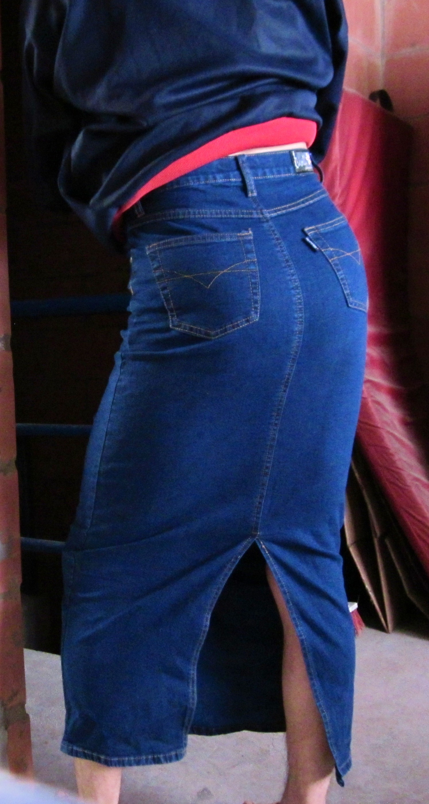 Tiene 95 cm de larga